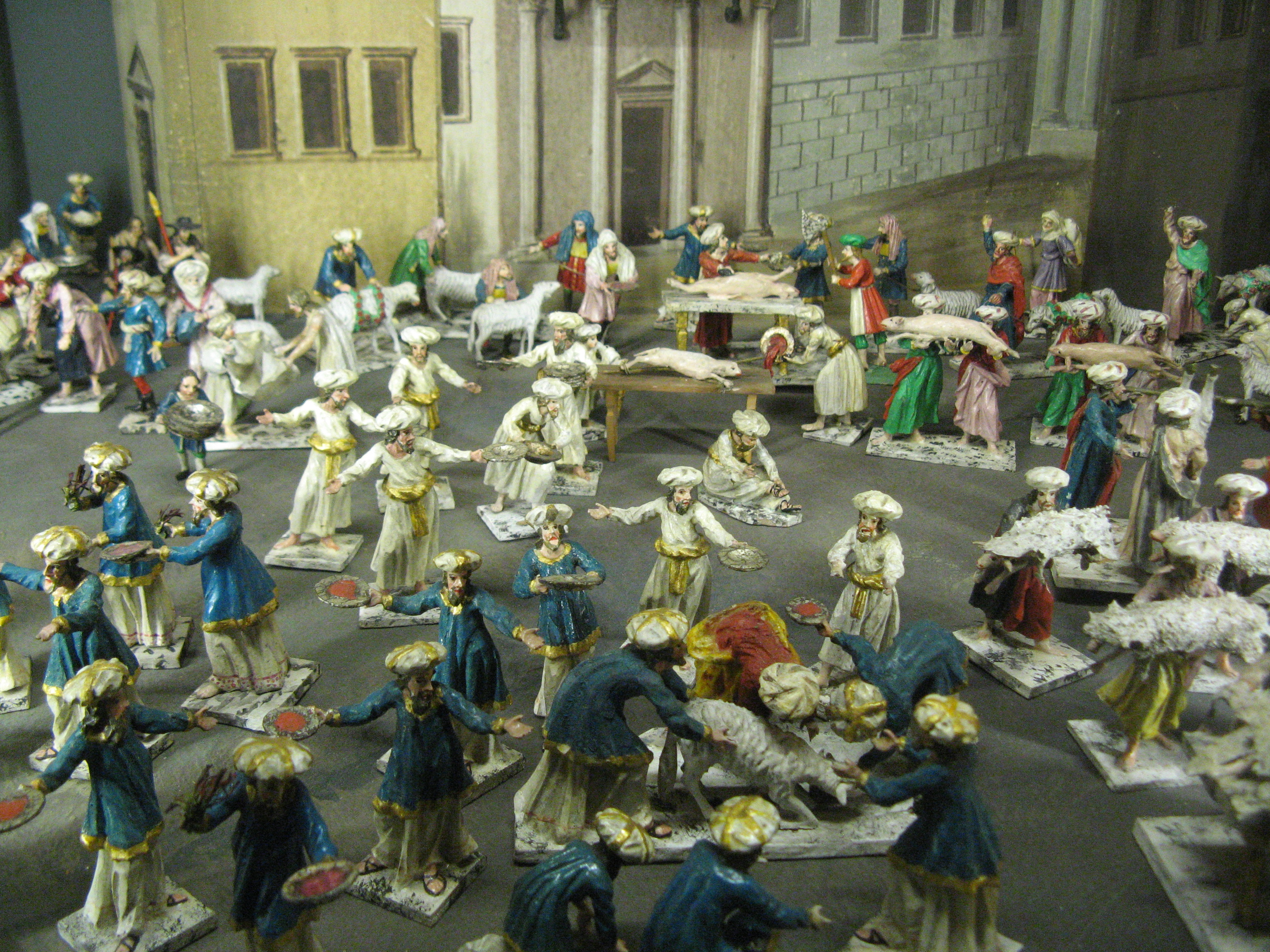 Augustin Alois Probst: Schlachten der Paschalämmer, Krippenmuseum Brixen